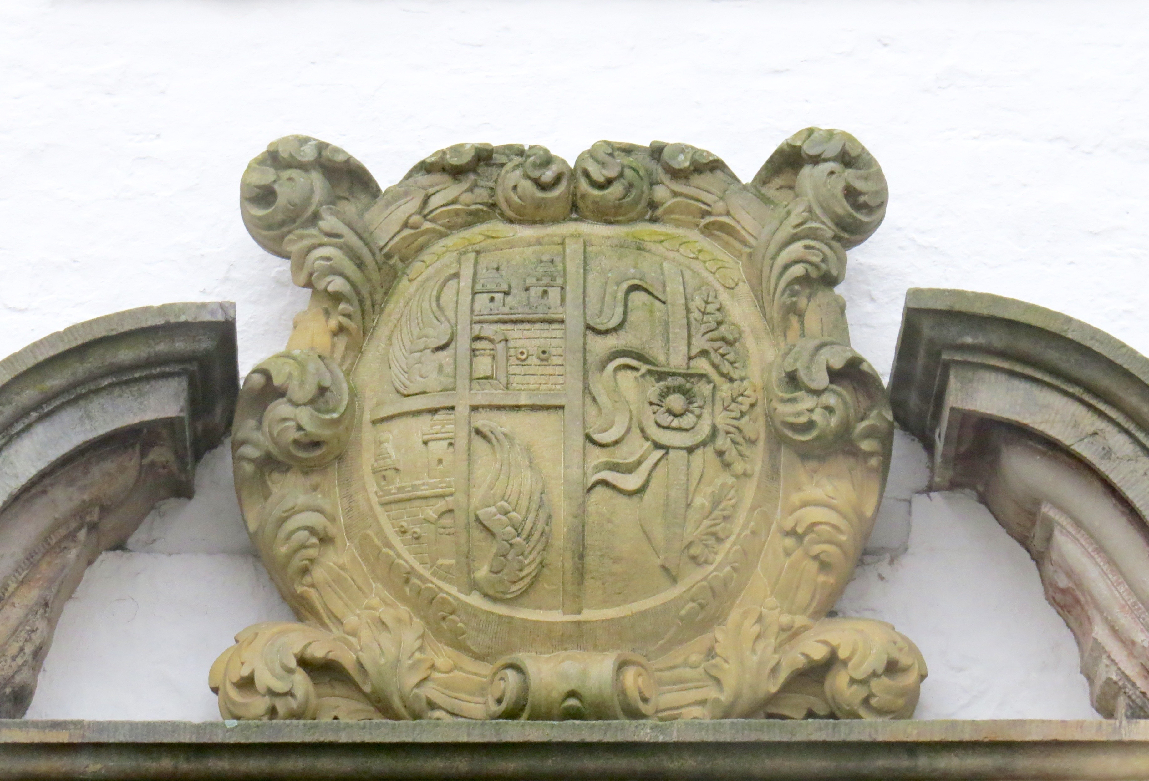 Bryllupsvåben for Johann Jacob von Wasmer (1671-1747) og Anna Johanna von Rosenschild (1683–1751) over indgangsportalen til Wasmer-Palais i Glückstadt, Holsten